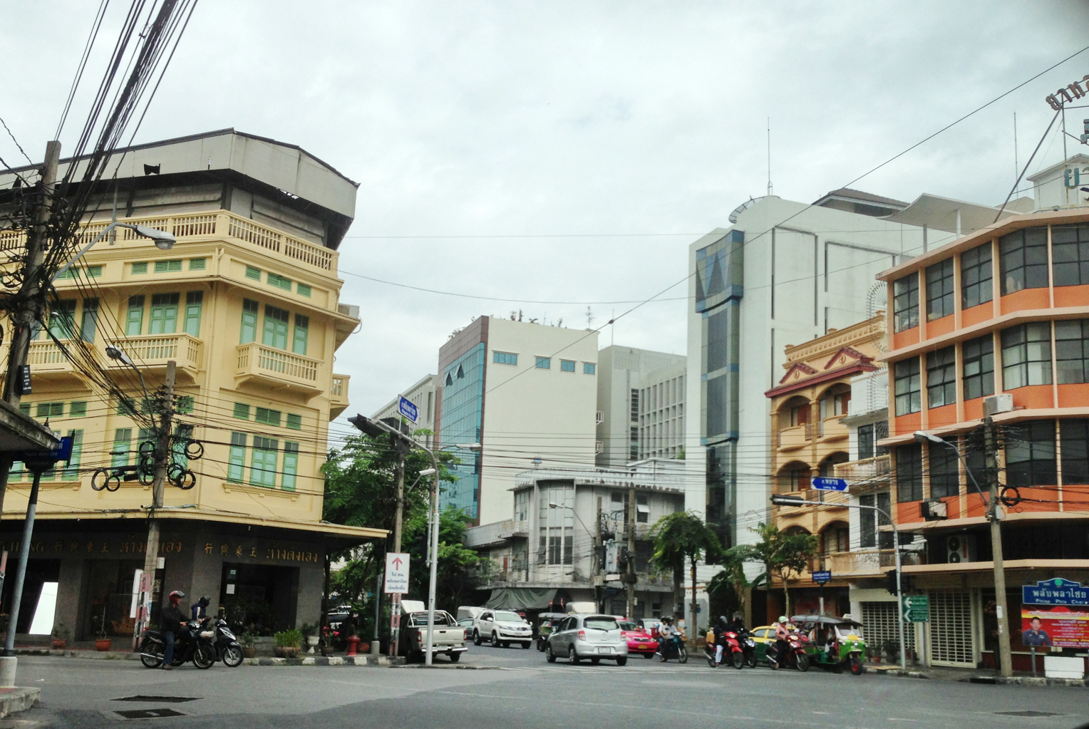 Luang -Phlap phla Chai, Wat Thepsirin, bangkok